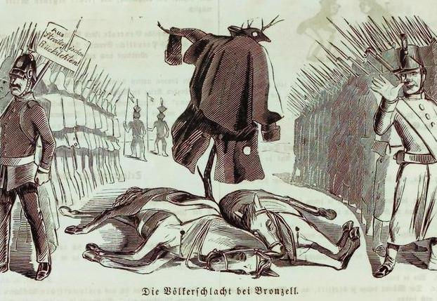 "Die Völkerschlacht von Bronnzell", in: Kladderadatsch Nr. 26, 1850